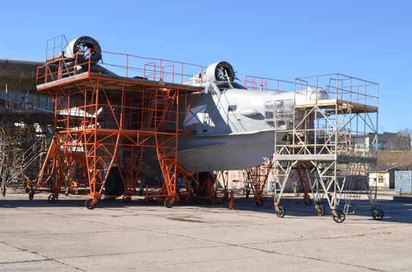 Андрей Васюта провел рабочую встречу с руководством Евпаторийского авиаремонтного завода